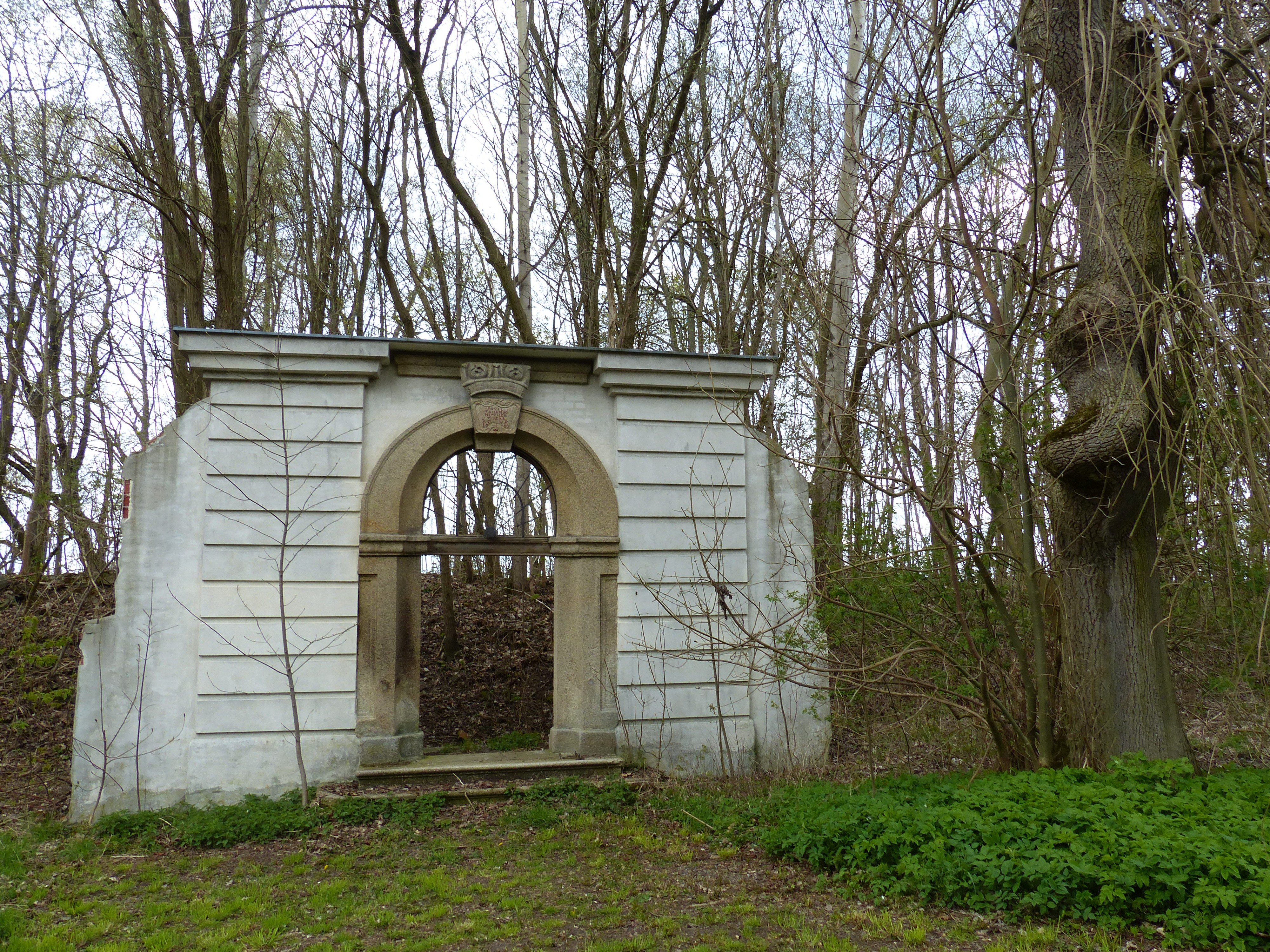 Serie Baudenkmäler und Ansichten von Regnitzlosau